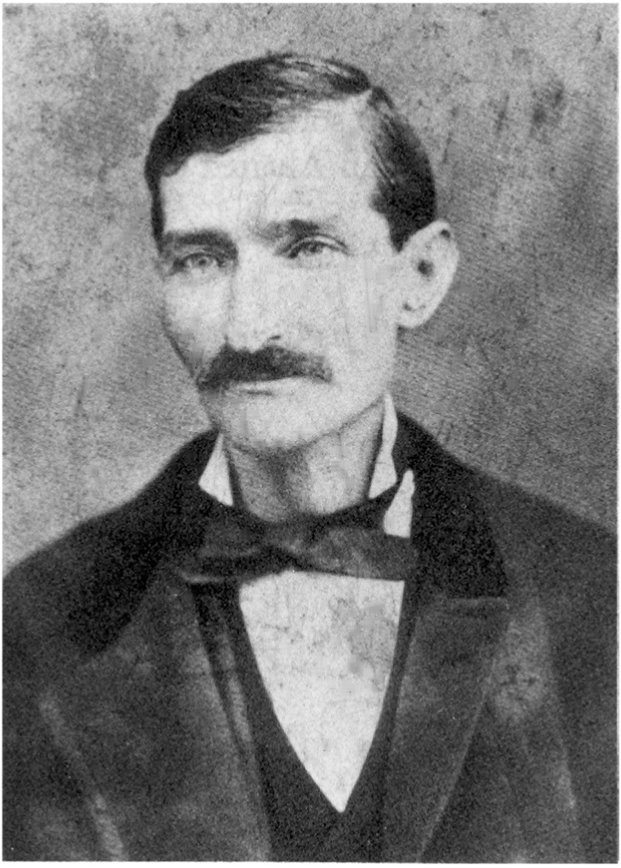 Fotografía de autor desconocido de Candido Lopez del Olmo y Malta